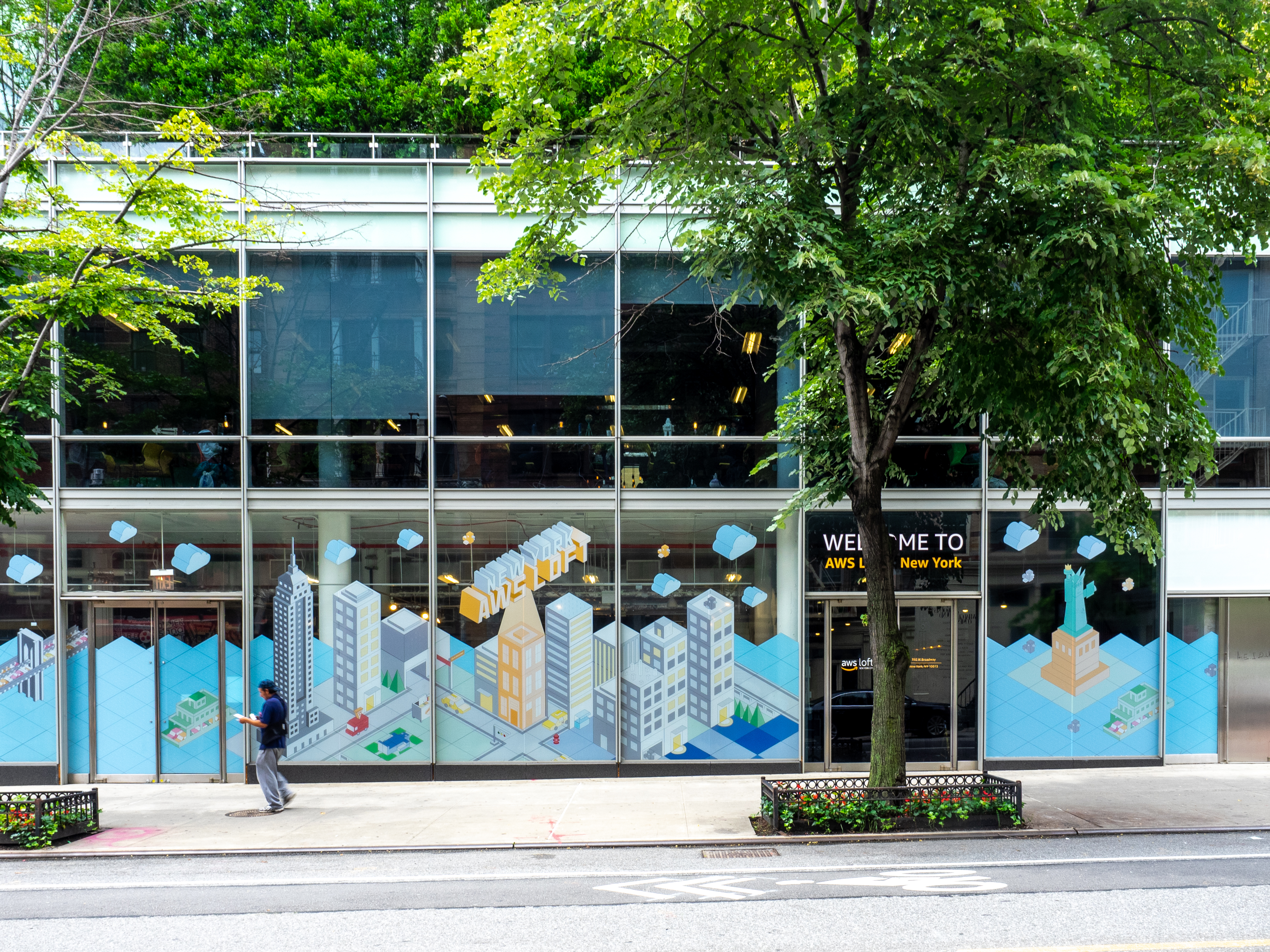 SoHo, NYC